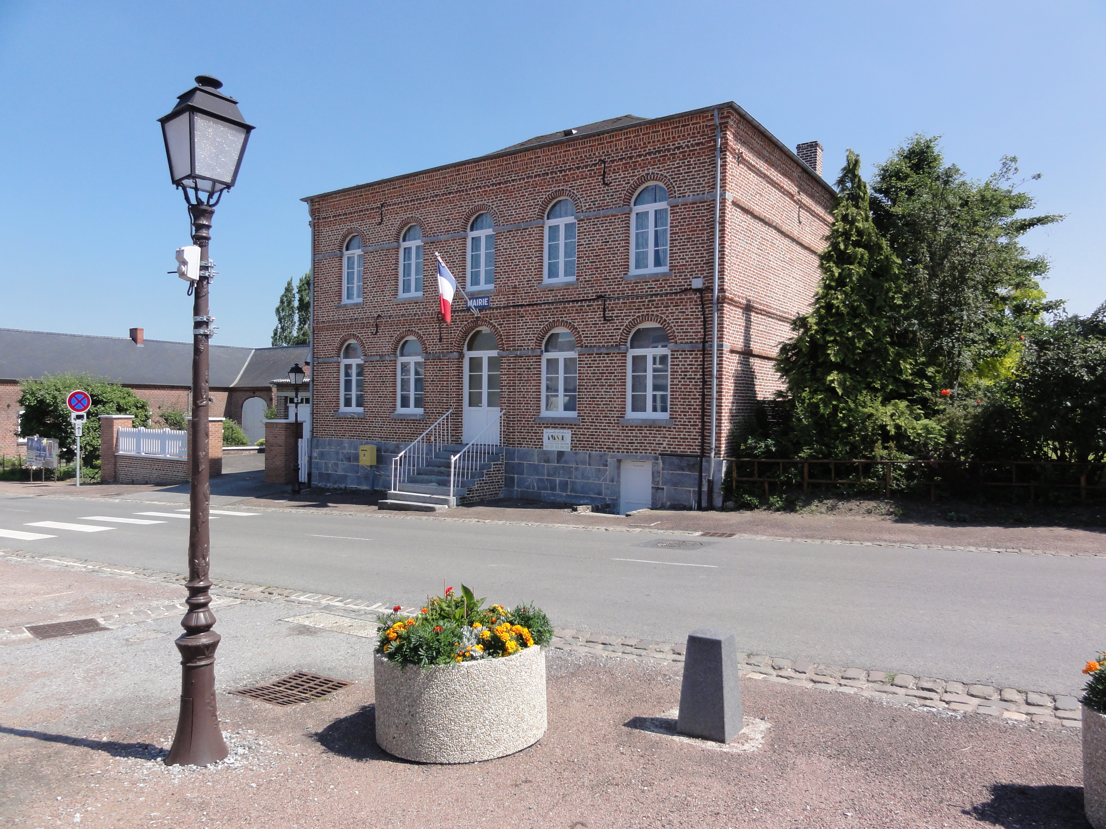 Fontenelle (Aisne, Fr) mairie